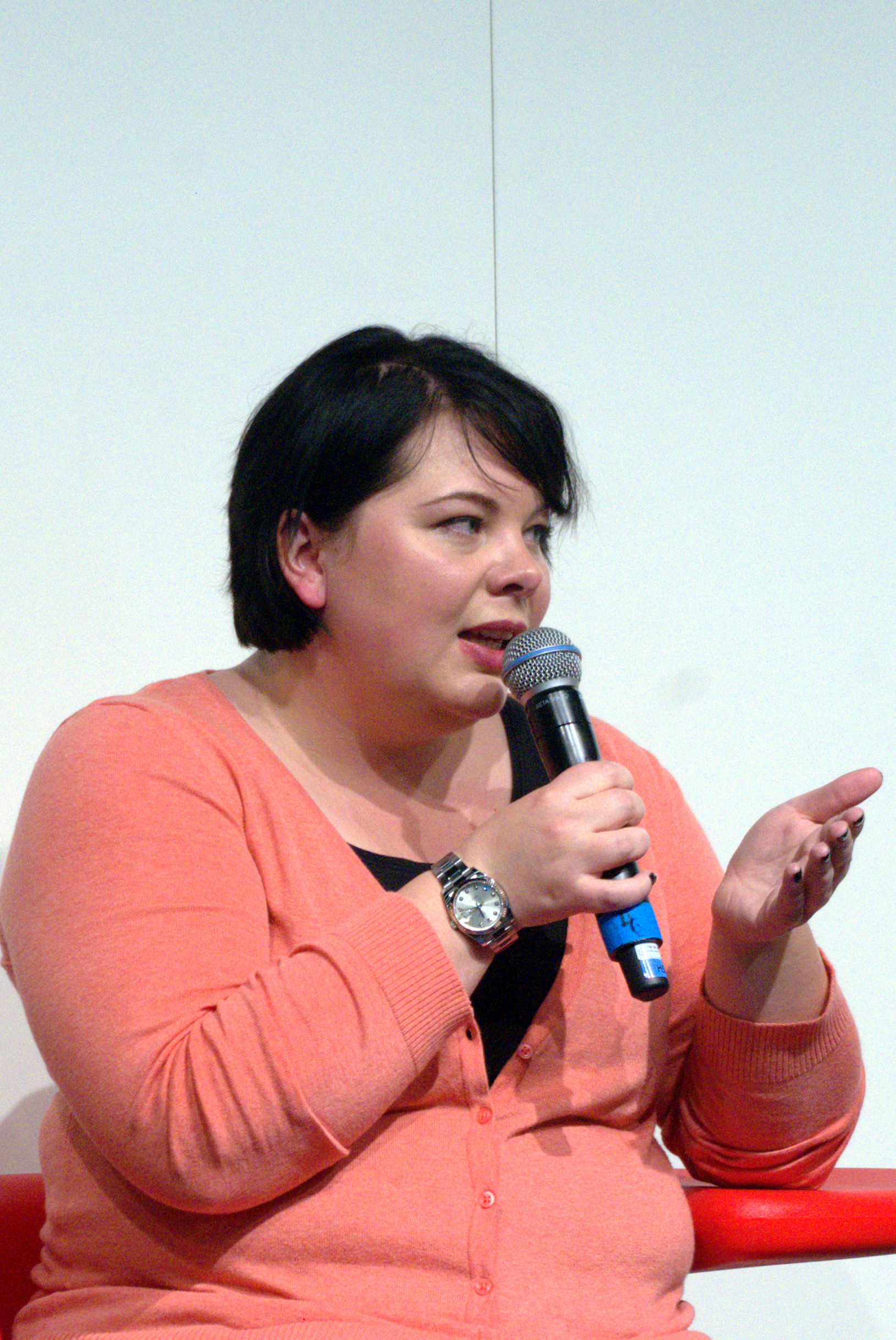 Frankfurter Buchmesse 2017. Diskussion über Selfpublishing im Orbanism Space mit Matthias Matting und Poppy Anderson